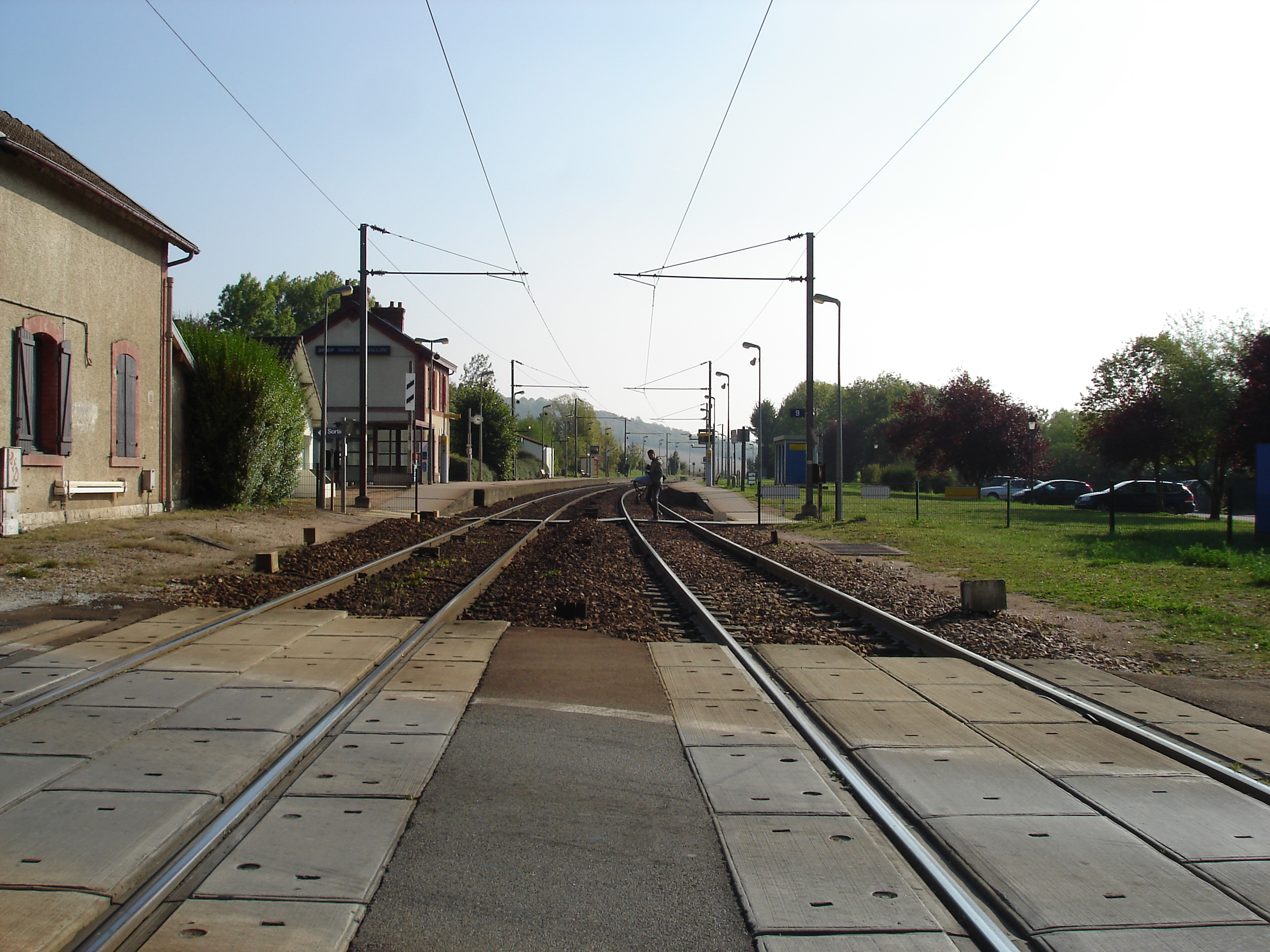 Gare de Mareil-sur-Mauldre (78) : Vue générale de la gare.